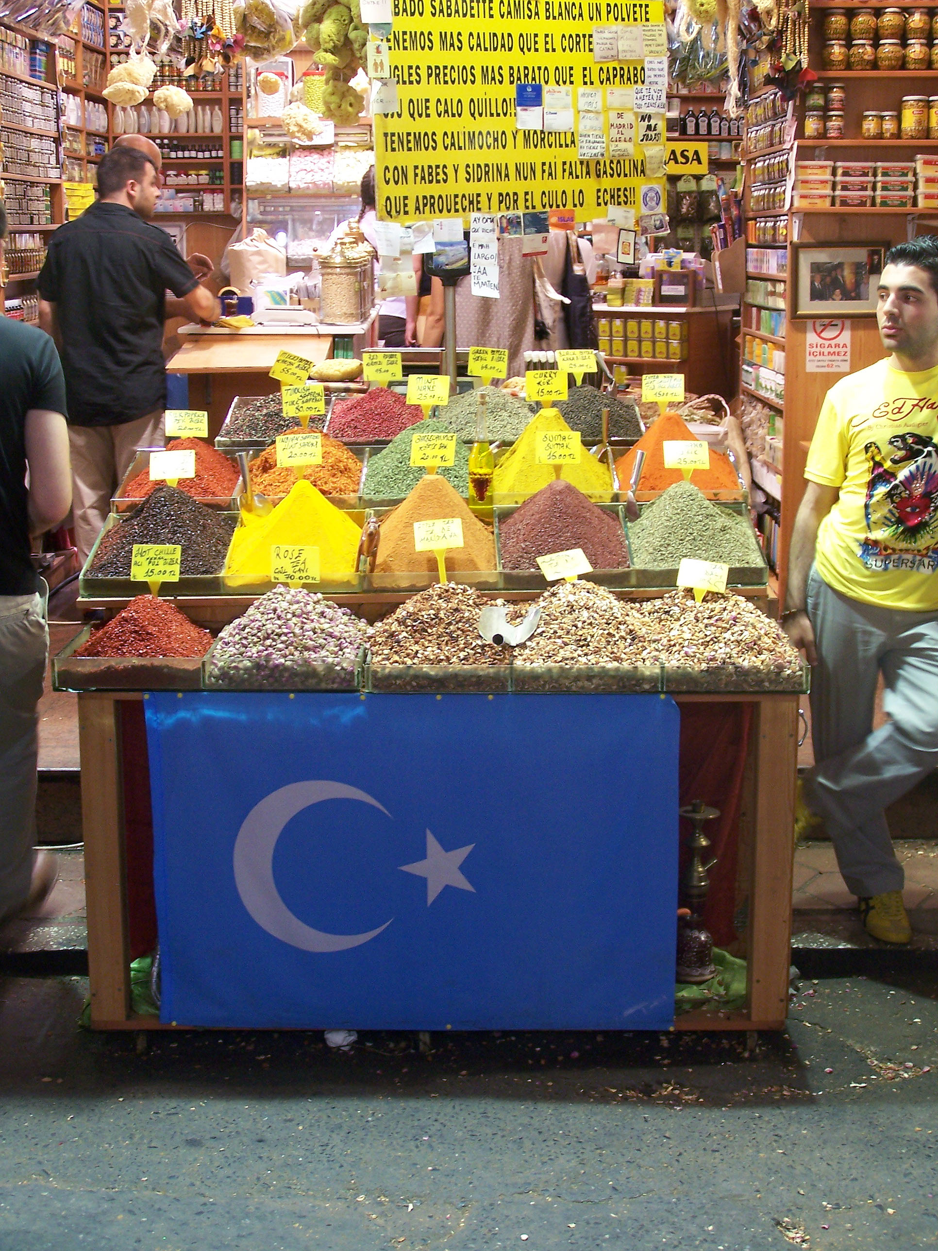 Flag of Doğu Türkistan (East Turkestan) at a shop at Mısır Çarşısı (Egyptian Bazaar) in Eminönu-Fatih